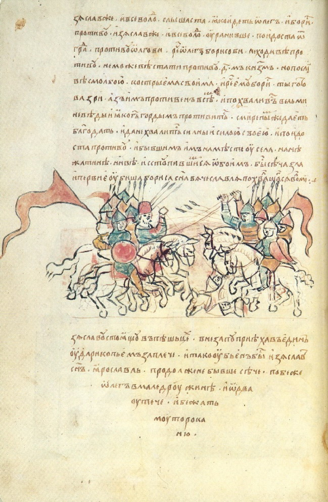 Радзивилловская (Кёнигсбергская) летопись.